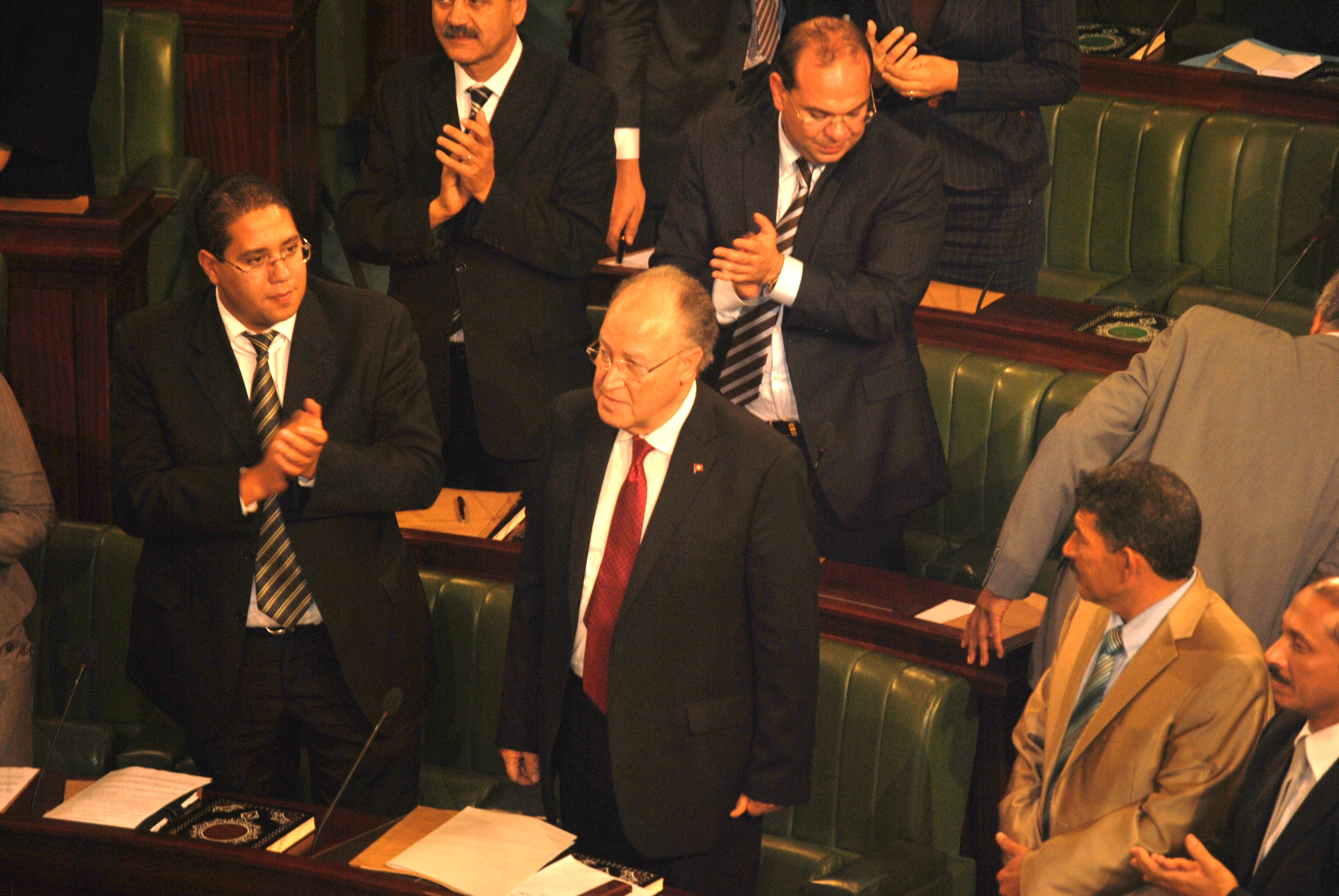 Mustapha Ben Jaaffar salué par les députés juste après son élection en tant que président de l'assemblée nationale constituante de 2011. A la droite de Ben Jaafar (à gauche en premier plan) on voit Mahmoud Baroudi. Juste debout derrière Ben Jaafar, on voit l'élu de Bizerte Mehdi Ben Gharbia et président du club de foot CAB.